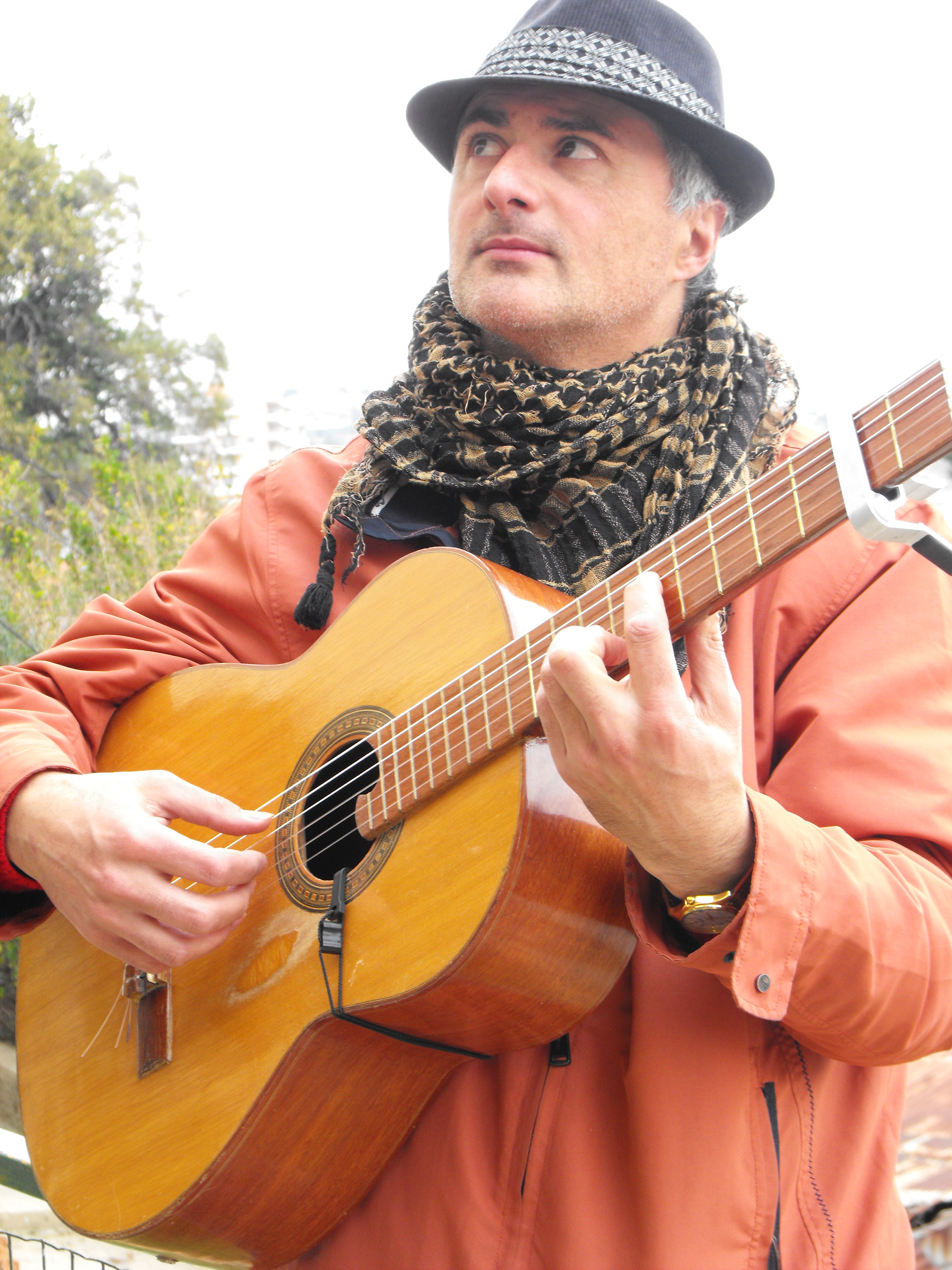 Cantautor y compositor chileno, autor del disco Muñeco de Trapo